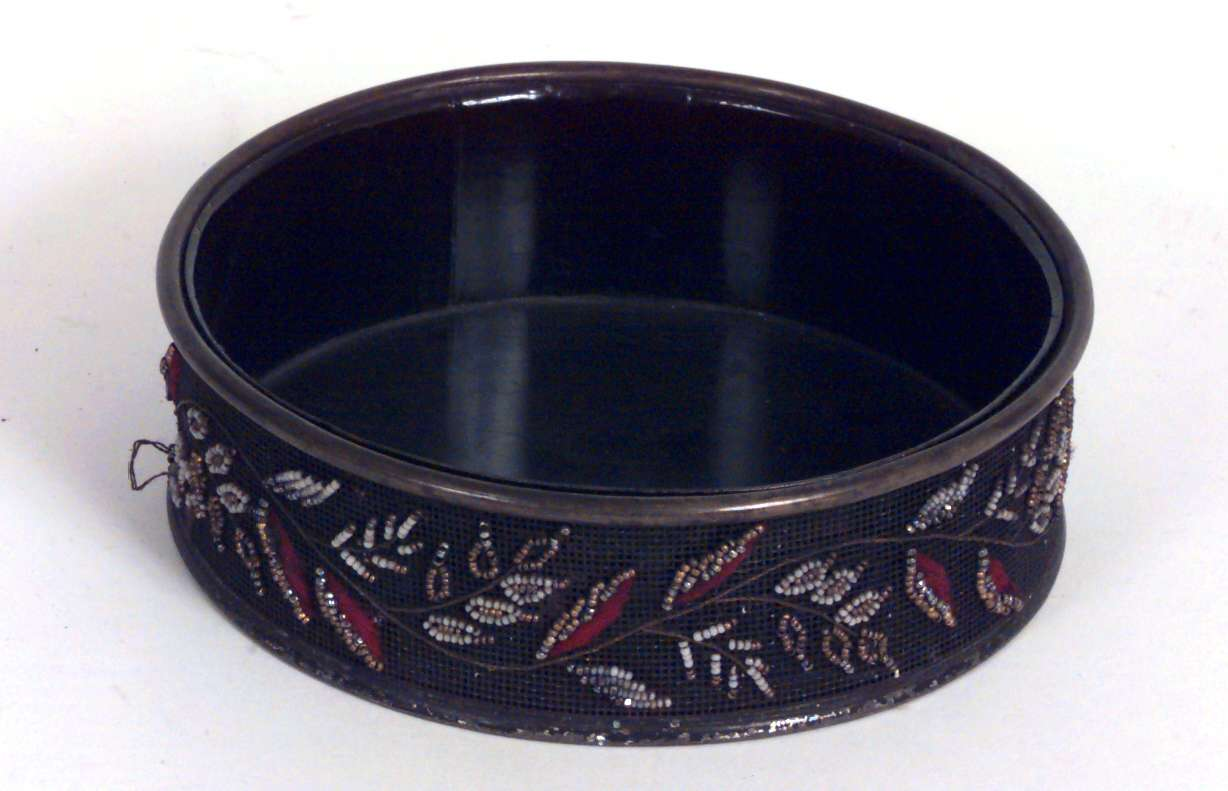 Flaskebrikke fra slutten av 1800-årene laget av metallblikk og dekorert med perlebroderi. Foto Anne-Lise Reinsfelt/Norsk Folkemuseum, NF.1921-1913AB.